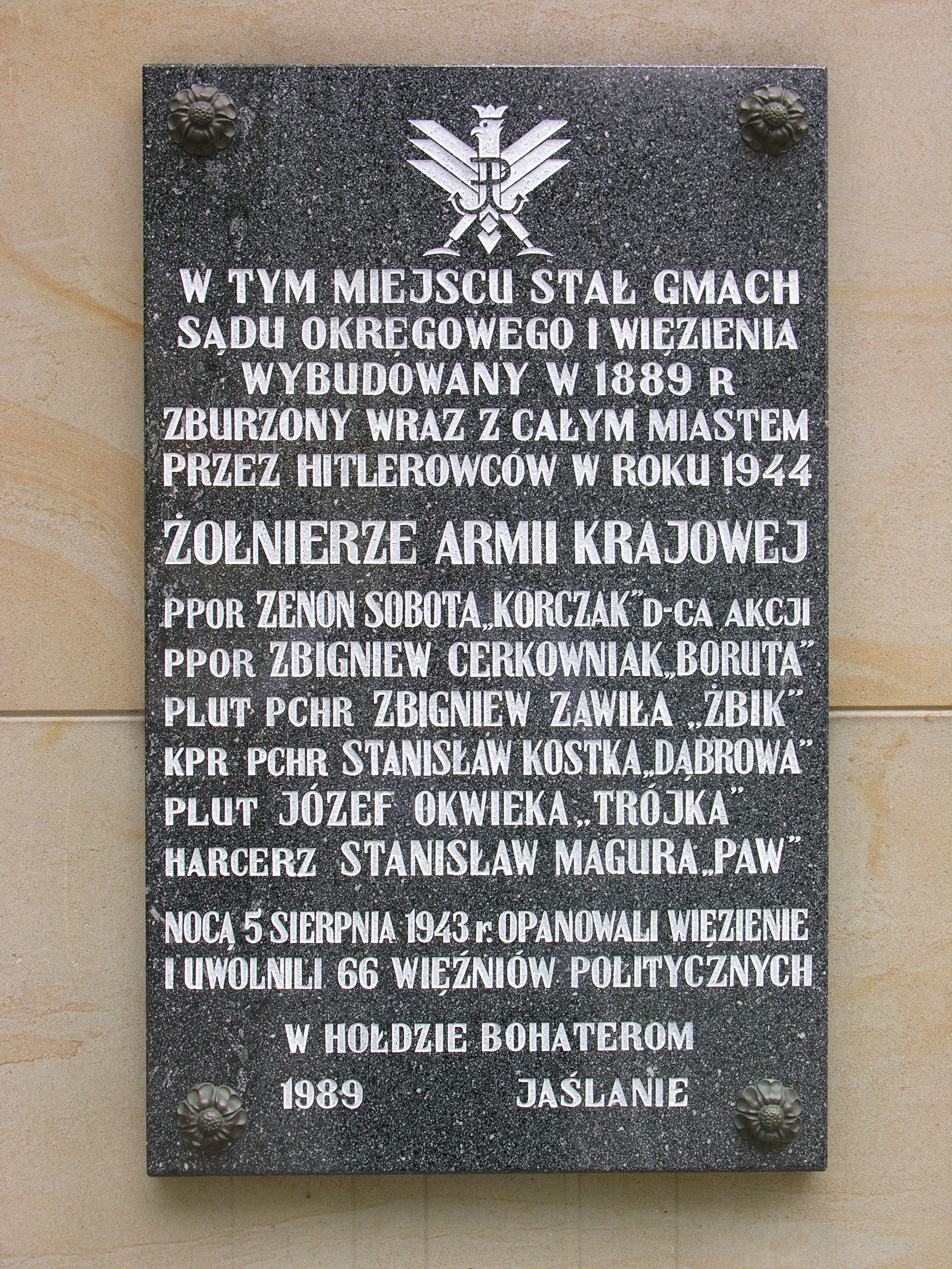 Tablica na pomniku Armii Krajowej w Jaśle upamiętniająca rozbicie więzienia